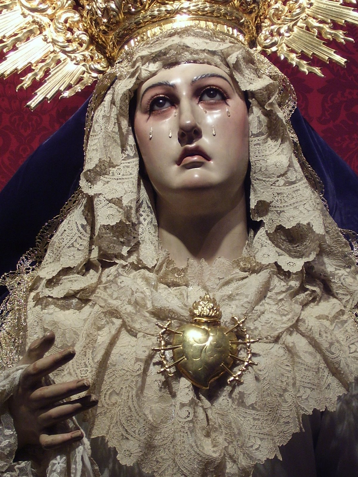 Nuestra Señora de los Dolores. Capilla del Sagrario de la Iglesia Parroquial de Santa María del Alcor. El Viso del Alcor (Sevilla). Procesiona bajo palio en la tarde noche del Viernes Santo